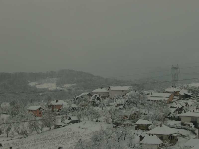 Pogled na selo Gornje Zabrdje u opstini Ugljevik.